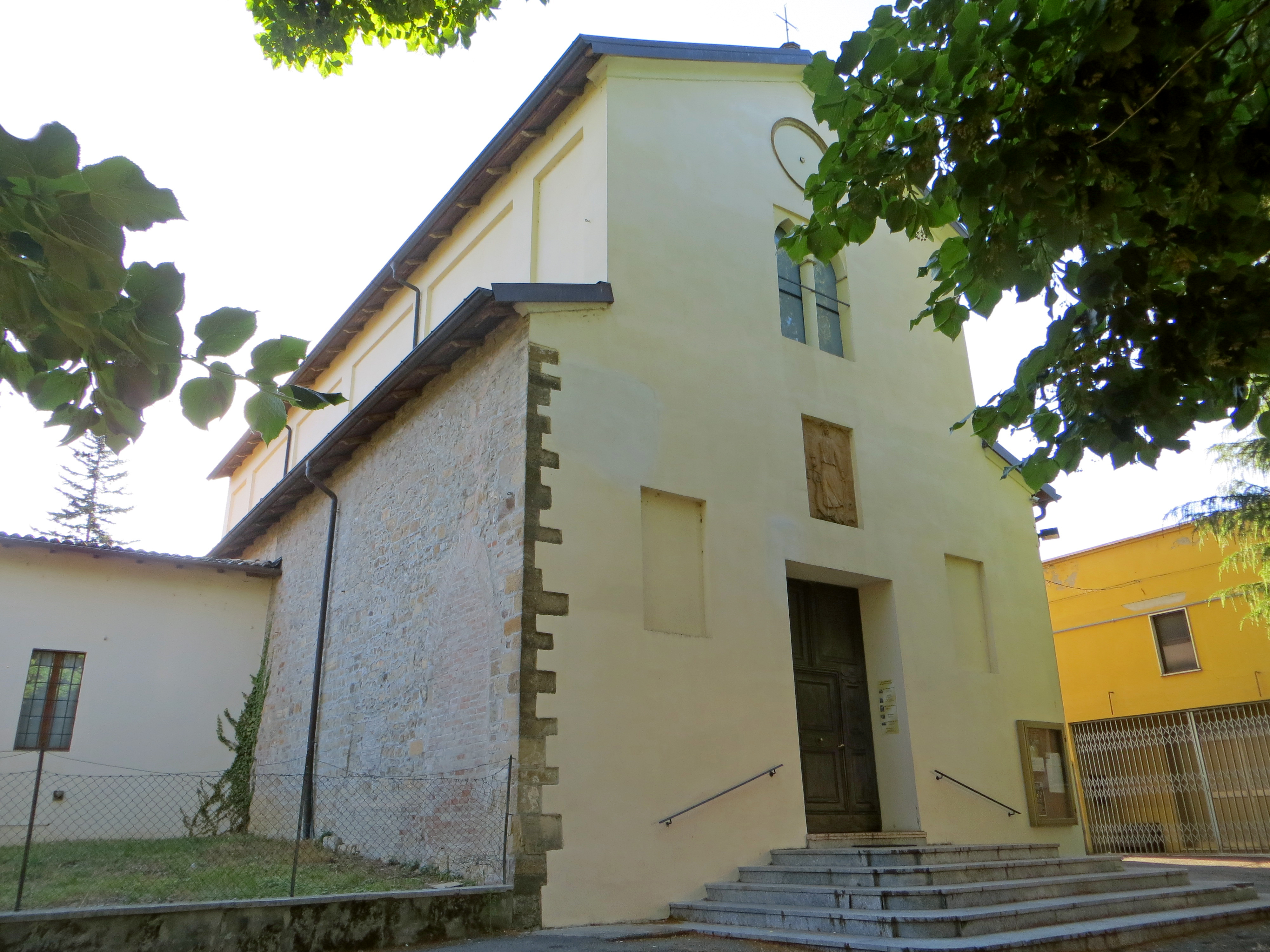 Chiesa di San Michele (San Michele Tiorre, Felino) - facciata e lato sud